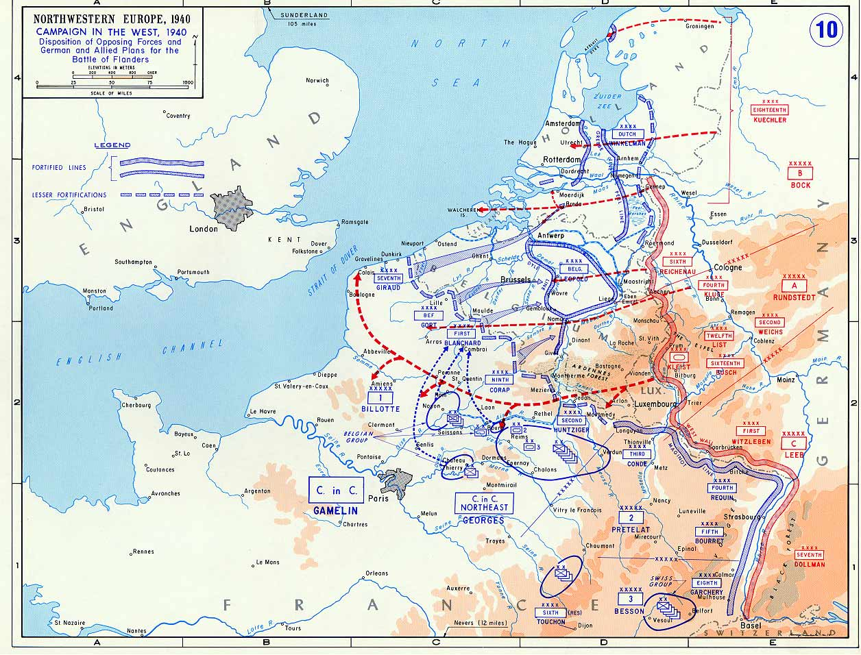 May 1940 plans